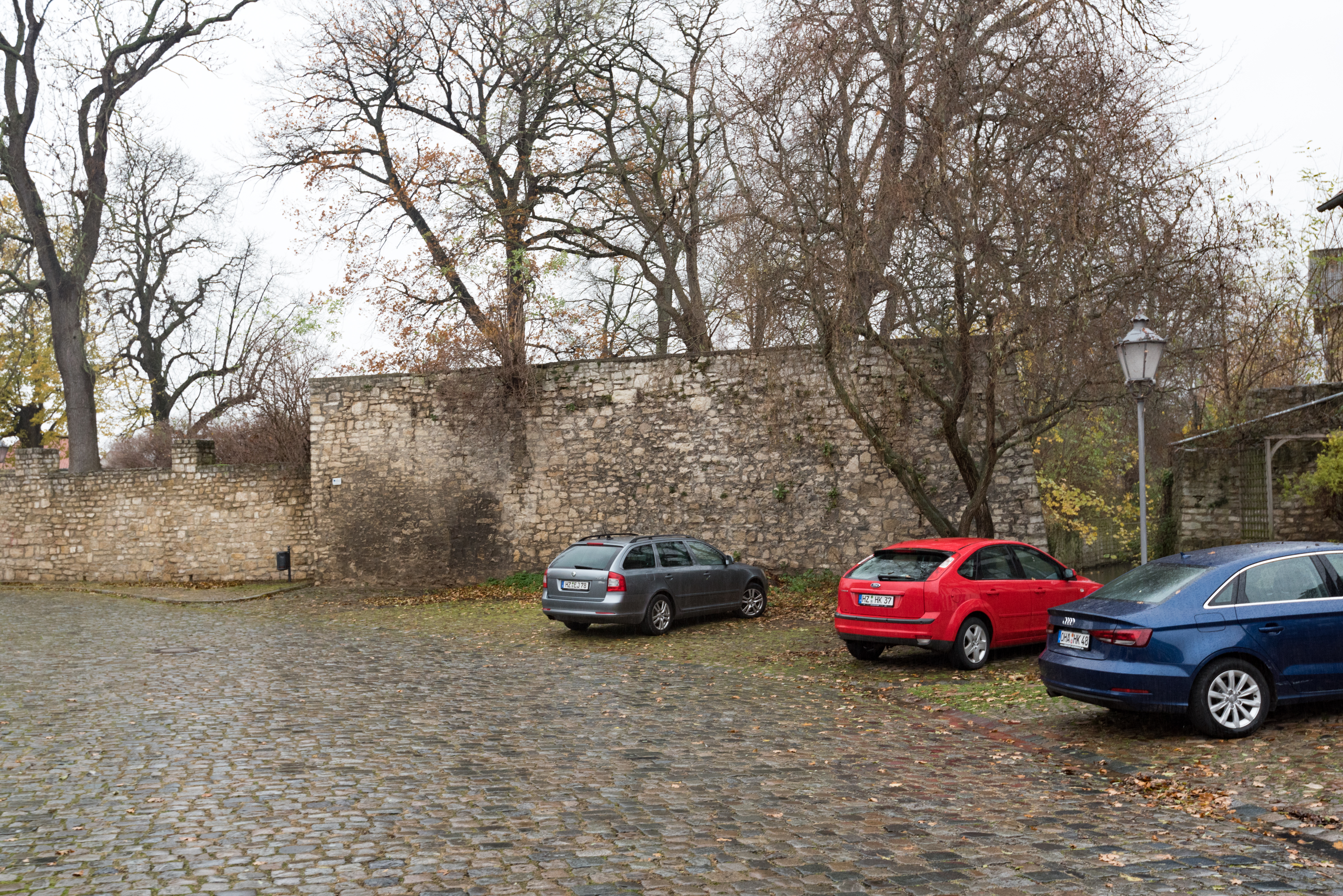 Schulzestraße, Stadtmauerrest Osterwieck